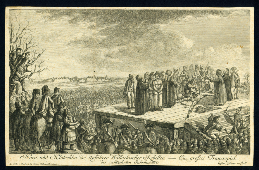 Hora und Klotschka die Anführer Wallachischer Rebellen Execuția lui Horea și Cloșca